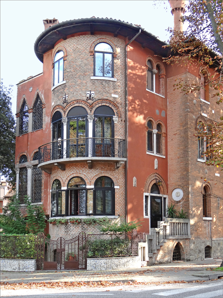 La villa Perez, de style éclectique, est orientée vers la lagune Cette maison a été la résidence de l'architecte Attilio Perez qui l'a conçue, à la fin du 19ème siècle ou au début du 20ème. Elle est décorée de motifs sculptés dans de la pierre d'Istrie Description détaillée de la villa ___________ Le Lido de Venise est une bande étroite de terre sablonneuse de 12 Km de long qui sépare la lagune de Venise de la mer Adriatique. Au 19ème siècle, le Lido commence à être fréquenté pour les bains de mer en raison de la beauté de ses plages. Le Grand Hôtel des Bains est ouvert en 1900 (il est actuellement en rénovation) et accueille des clients illustres (écrivains, aristocrates, artistes,..) comme le Grand Hôtel Excelsior, construit dans le style néo-mauresque, ouvert à proximité quelques années plus tard, en 1908. A la demande de Mussolini, le Palais du cinéma ne sera construit dans le style art déco qu'en 1937 à coté de l'Excelsior pour que le festival (Mostra) puisse s'y dérouler dans de bonnes conditions. Concentrées autour de ces palaces, de luxueuses maisons sont édifiées à partir du début du siècle dernier, dans des styles influencés par l'art nouveau (appelé style Liberty en Italie), ou un peu plus tard par l'art déco, mais aussi par l'art byzantin, l'art médiéval, l'art de la Renaissance italienne, l'art oriental ou même par l'art du nord de l'Europe. En raison de la proximité de Venise, les formes et décors vénitiens constituent d'importantes sources d'inspiration des architectes. Il en résulte un ensemble de maisons et d'immeubles dans le style éclectique, avec des éléments de style Liberty, qui ne se rencontre que dans cette région de l'Italie. Article de Wikipedia sur le Lido de Venise